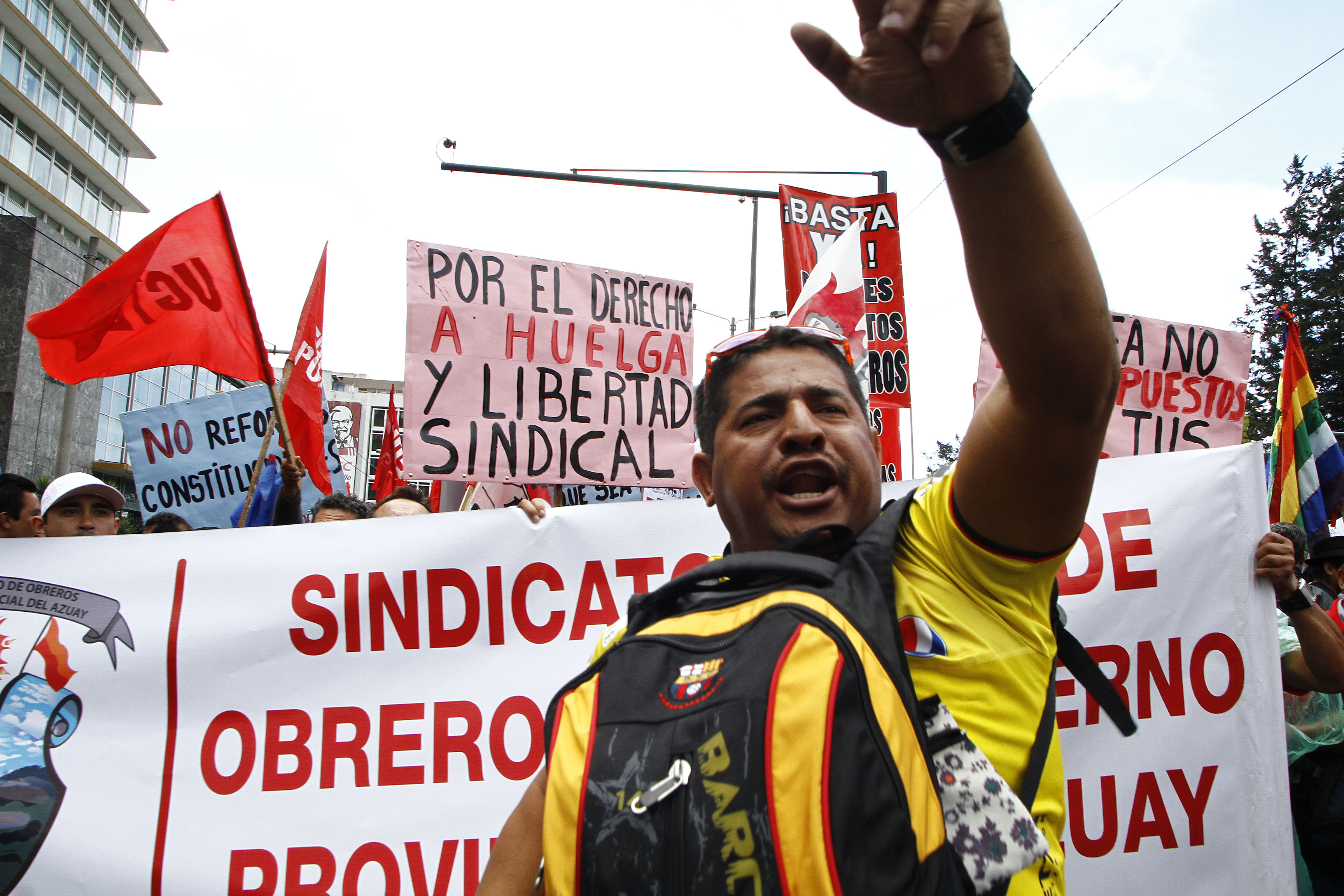 Quito, 17 sep (Andes).- Aproximadamente 600 opositores integrantes de movimientos sindicales como el Frente Unitario de Trabajadores, miembros del Movimiento Popular Democrático y de organizaciones indígenas como la Confederación de Nacionalidades Indígenas del Ecuador (Conaie) se congregaron en el Parque El Ejido y marcharon rumbo a la Plaza de San Francisco en el centro de la ciudad. Foto: Micaela Ayala V./Andes